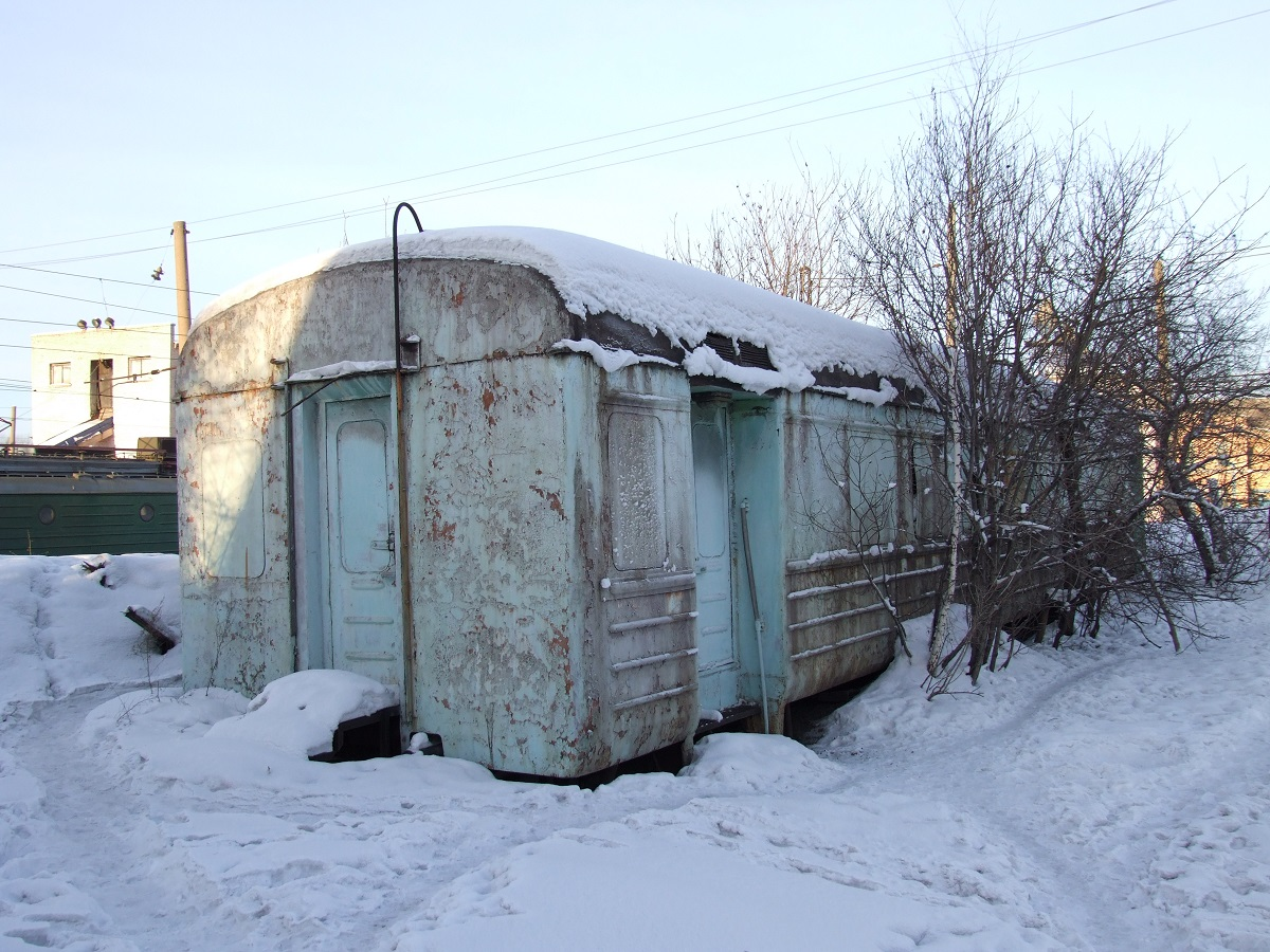 Кузов вагона электропоезда СН-002. Депо Смычка, Свердловская область, Россия